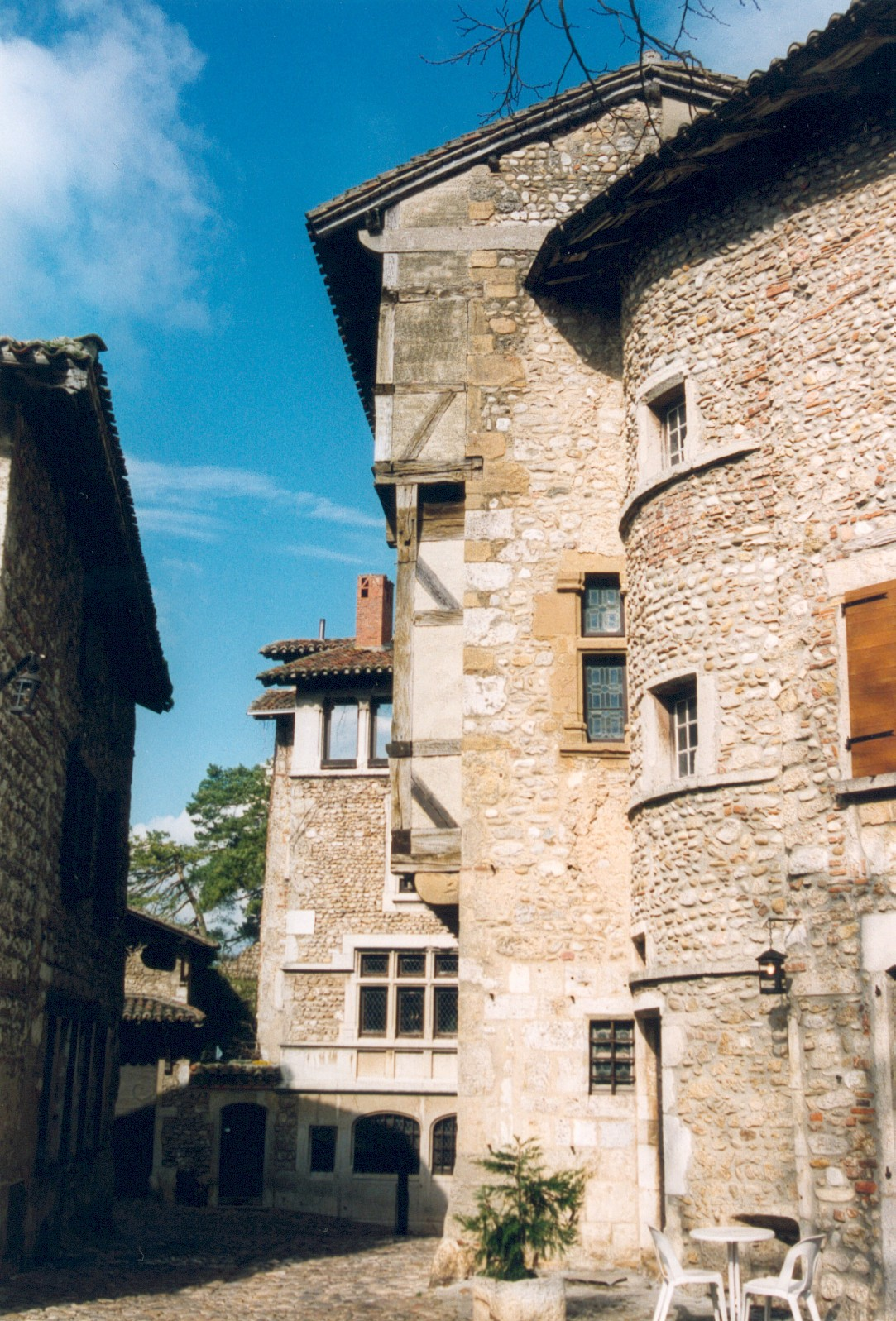 France Ain Pérouges Photographie prise par GIRAUD Patrick